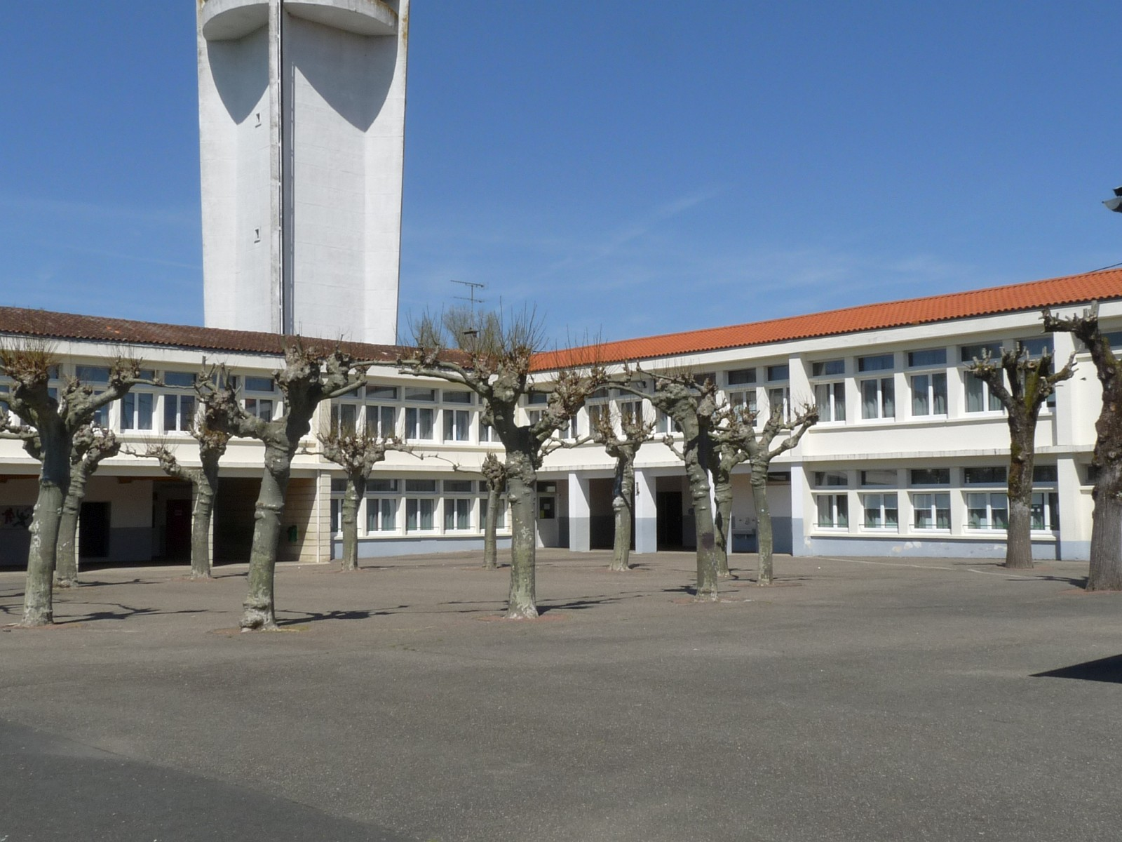 Ecole, Les Eglisottes, Gironde, France